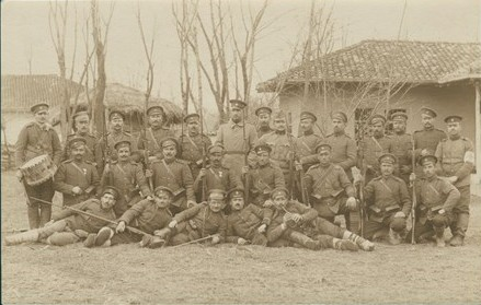 Снимки на взвод от 7-ма рота на 5-ти механизиран полк заснети в с. Ряхово, Русенско през Първата световна война.